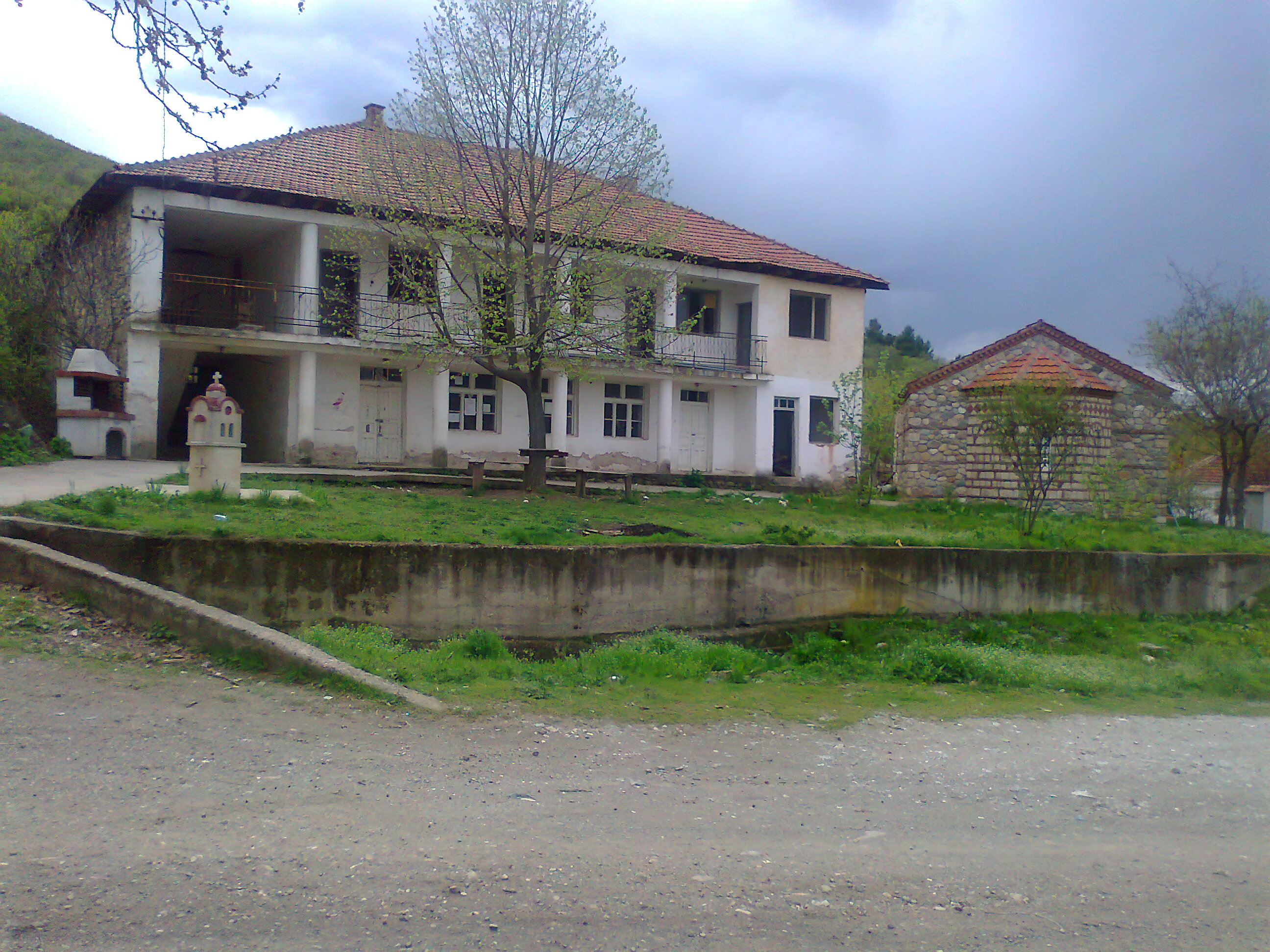 Sobri